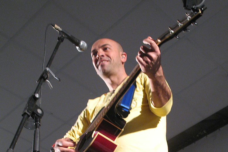 Pavlo Rozenberg, Israeli singer